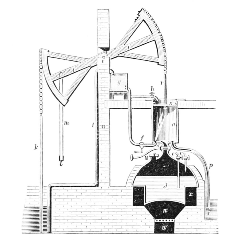 Newcomen engine 1705